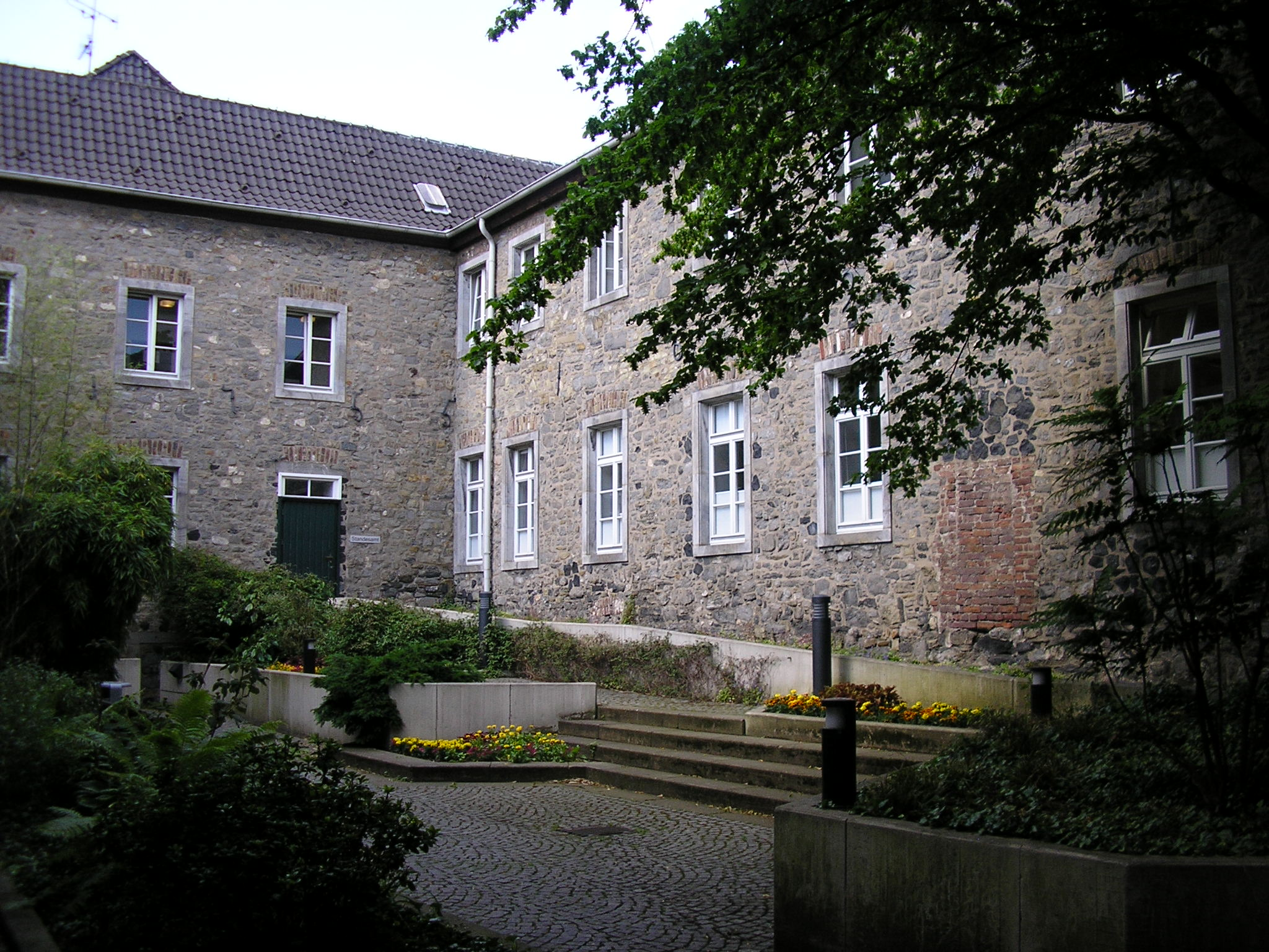 ehemaliges Minoritenkloster zu Ratingen